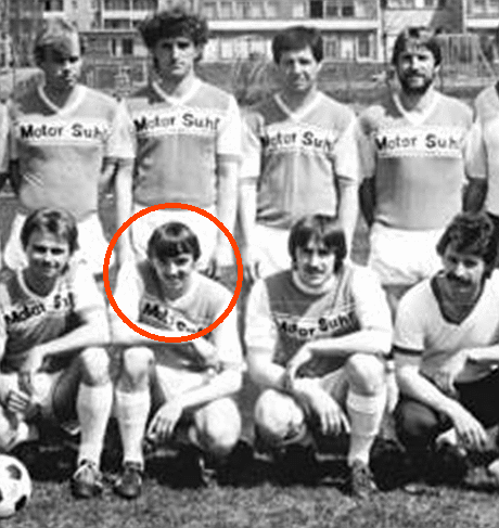 Title: Mannschaftsfoto BSG Motor Suhl Factual corrections and alternative descriptions are encouraged separately from the original description. Additionally errors can be reported at this page to inform the Bundesarchiv. Original historic description: ADN-ZB Schaar 16.6.84 Suhl: Aufsteiger zur Fußball-Oberliga 1984-85: BSG Motor Suhl. Einen Spieltag vor Abschluß der Aufstiegsrunde sicherte sich die BSG Motor Suhl einen der beiden freien Plätze in der Fußball-Oberliga. Die Thüringer spielen damit in der nächsten Serie erstmals in der höchsten DDR-Fußballklasse. Hintere Reihe v.l.n.r.: Trainer Paul Kersten, Wolfgang Reuter, Peter Staps, Hartmut Weiß, Andreas Böhm, Roman Seyfarth, Andreas Schneider, Dieter Kurth, Klaus Schröder, Matthias Brückner, Erhard Mosert, Gerd Schellhase, Mannschaftsleiter Frank Hoffmann und Trainer Ernst Kurth. Vordere Reihe v.l.n.r.: Masseur Peter Eichelbrenner, Klaus Semineth, Dieter Erhardt, Jürgen Schneider, Torhüter Walter Jänicke, Torhüter Klaus Müller, Ralf Eismann, Uwe Jertschewski, Uwe Trömel und Trainer Burkhardt Winkler.